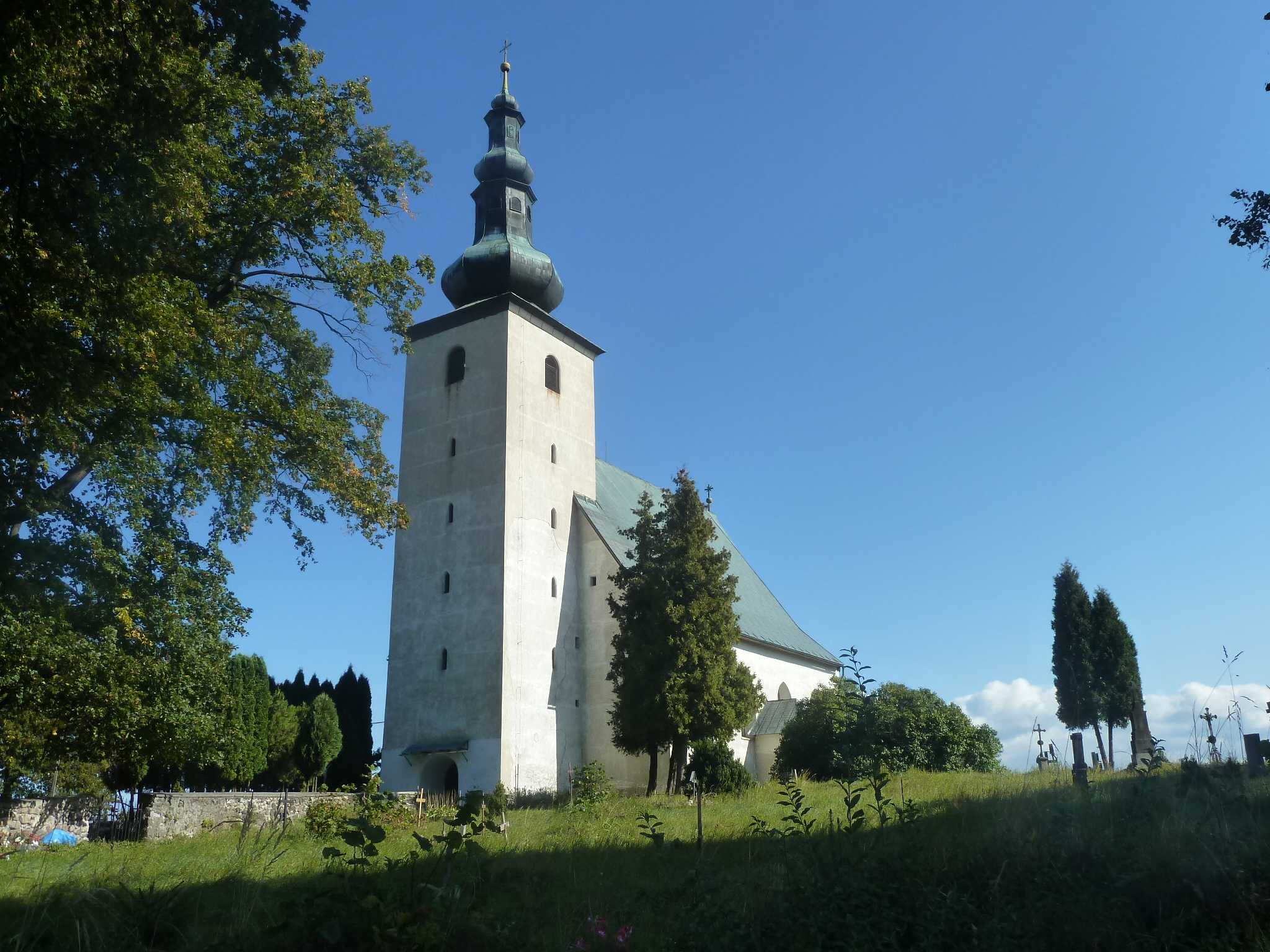 Rímskokatolícky kostol v obci Sklené